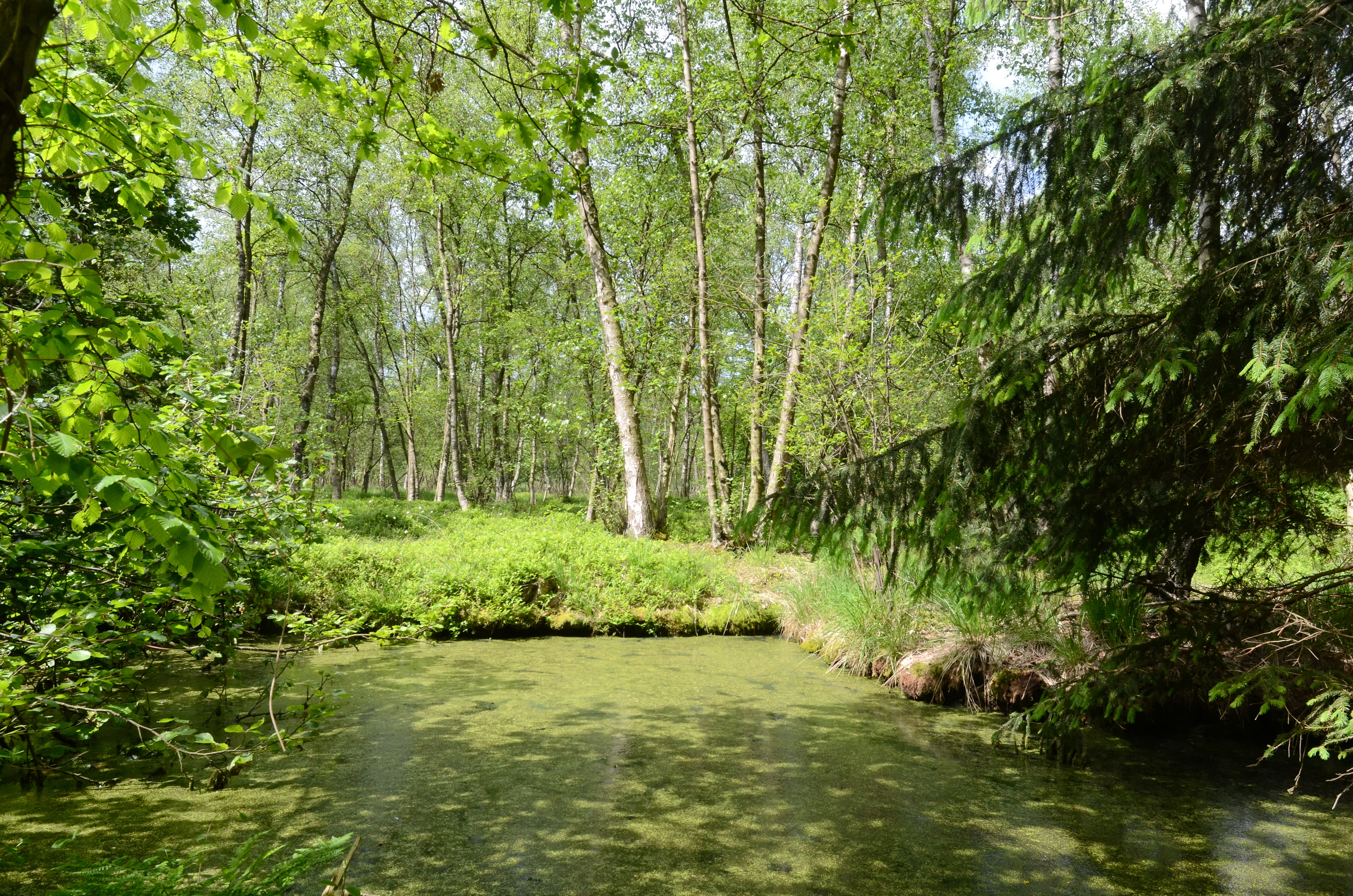 NSG „Grönauer Heide, Grönauer Moor und Blankensee“ alter Torfstich im Grönauer Moor